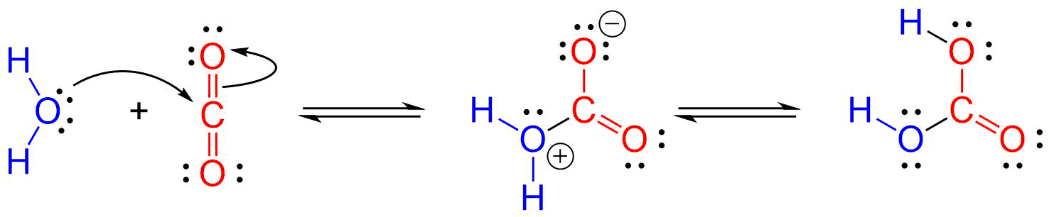 Hiilihappoa muodostuu, kun hiilidioksidia liuotetaan veteen.